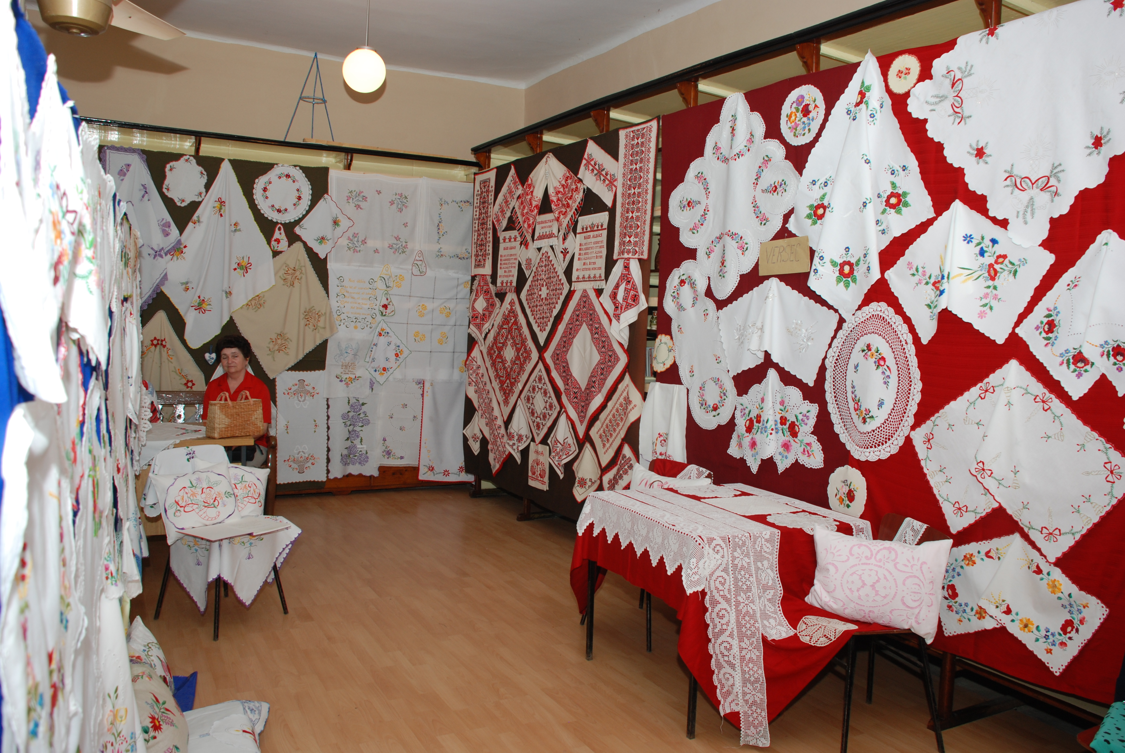 Izložba radova 20-ta jubilarna smotra KUD folklora južno banatckih Mađara. šušara 2009 g